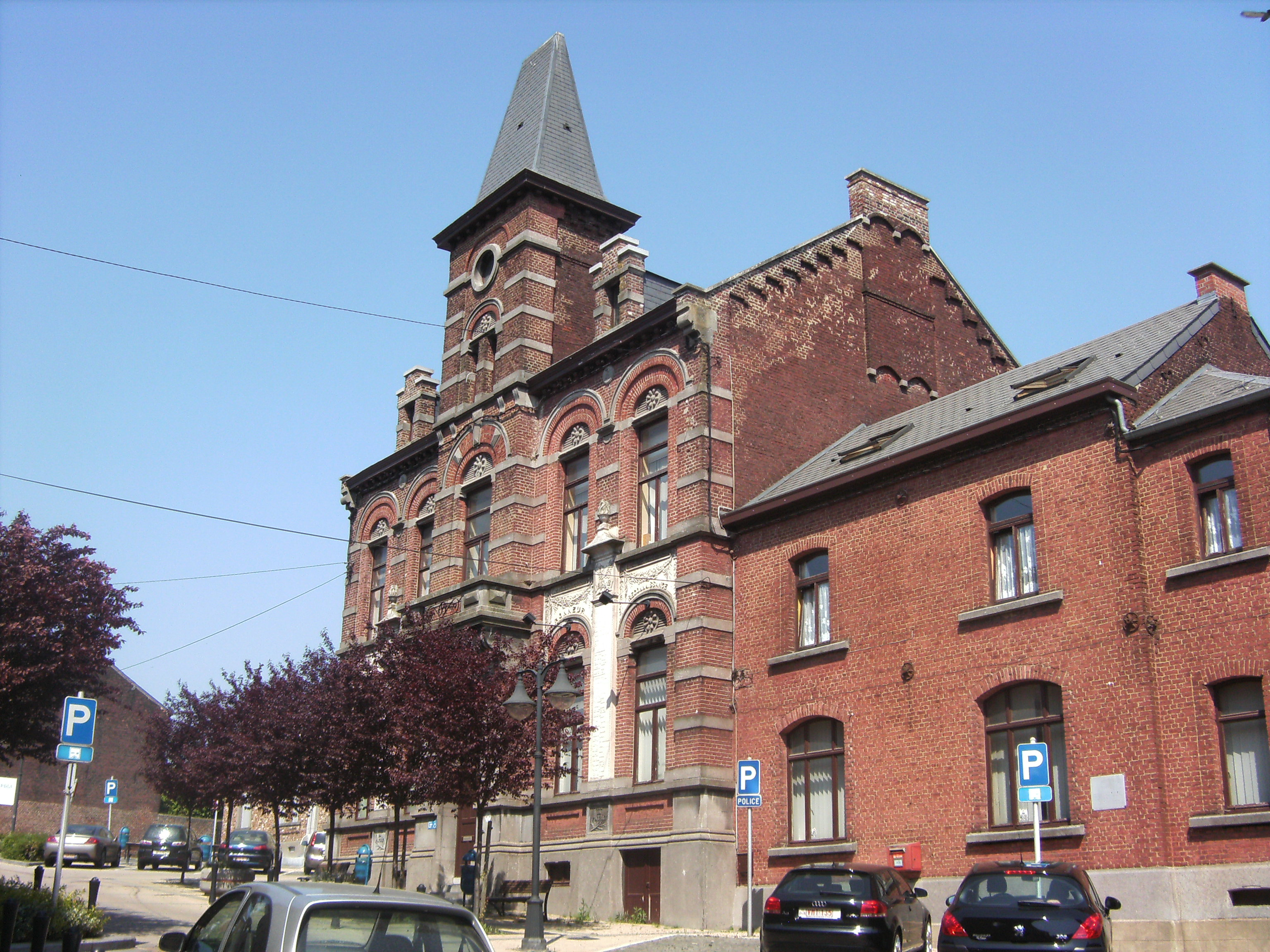 Roux (Charleroi - Belgique) - Hôtel de Ville (1895)